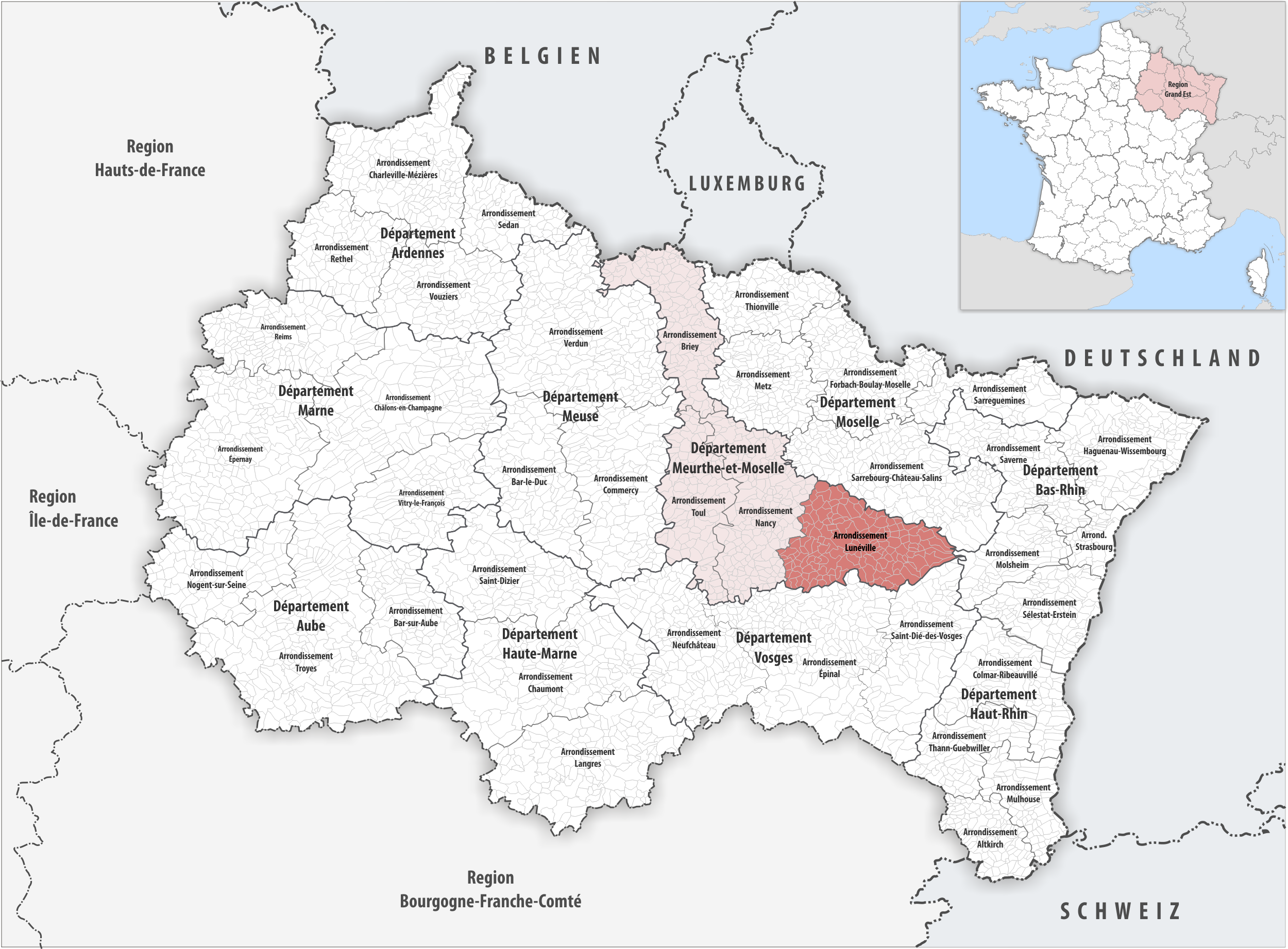 Lage des Arrondissements Lunéville